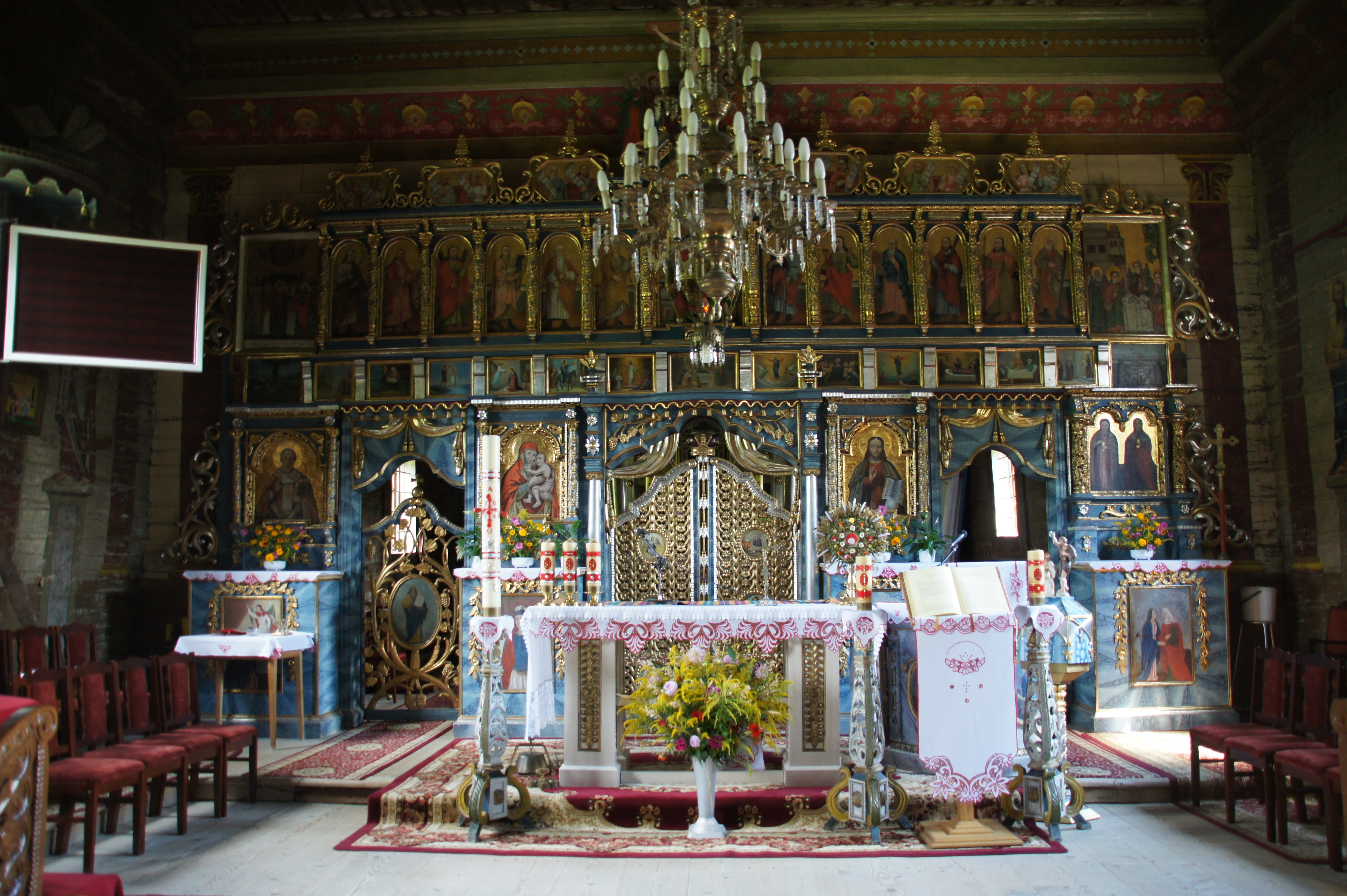 Berest, cerkiew par. p.w. śś. Kosmy i Damiana, ob. kościół rzym.-kat. p.w. Matki Boskiej N…, 1842